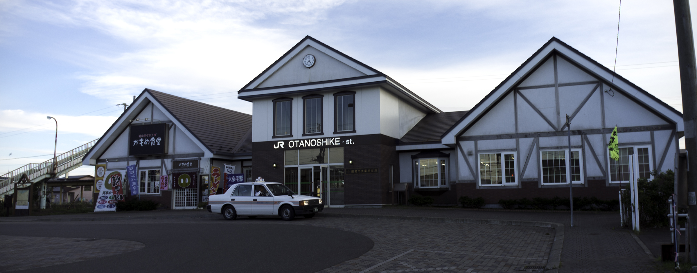 北海道旅客鉄道株式会社根室本線大楽毛駅舎